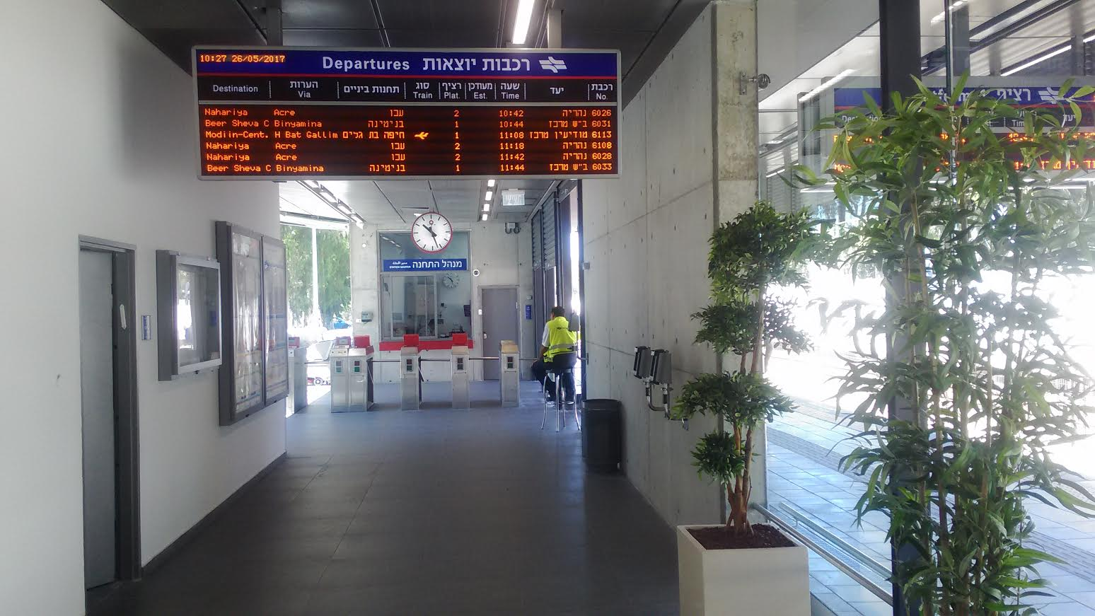 מאי 2017